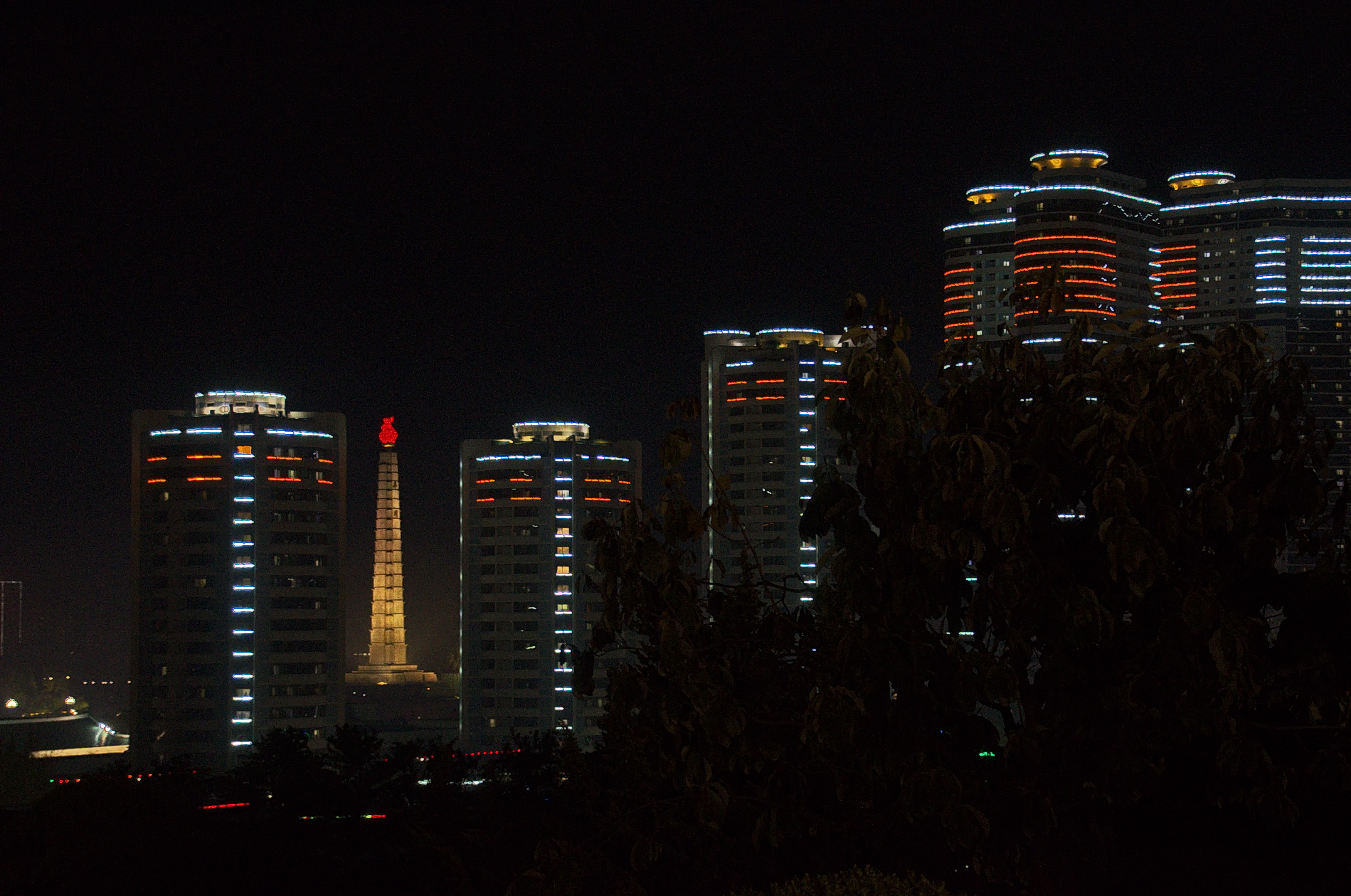 Nordkorea 2015 - Pjöngjang